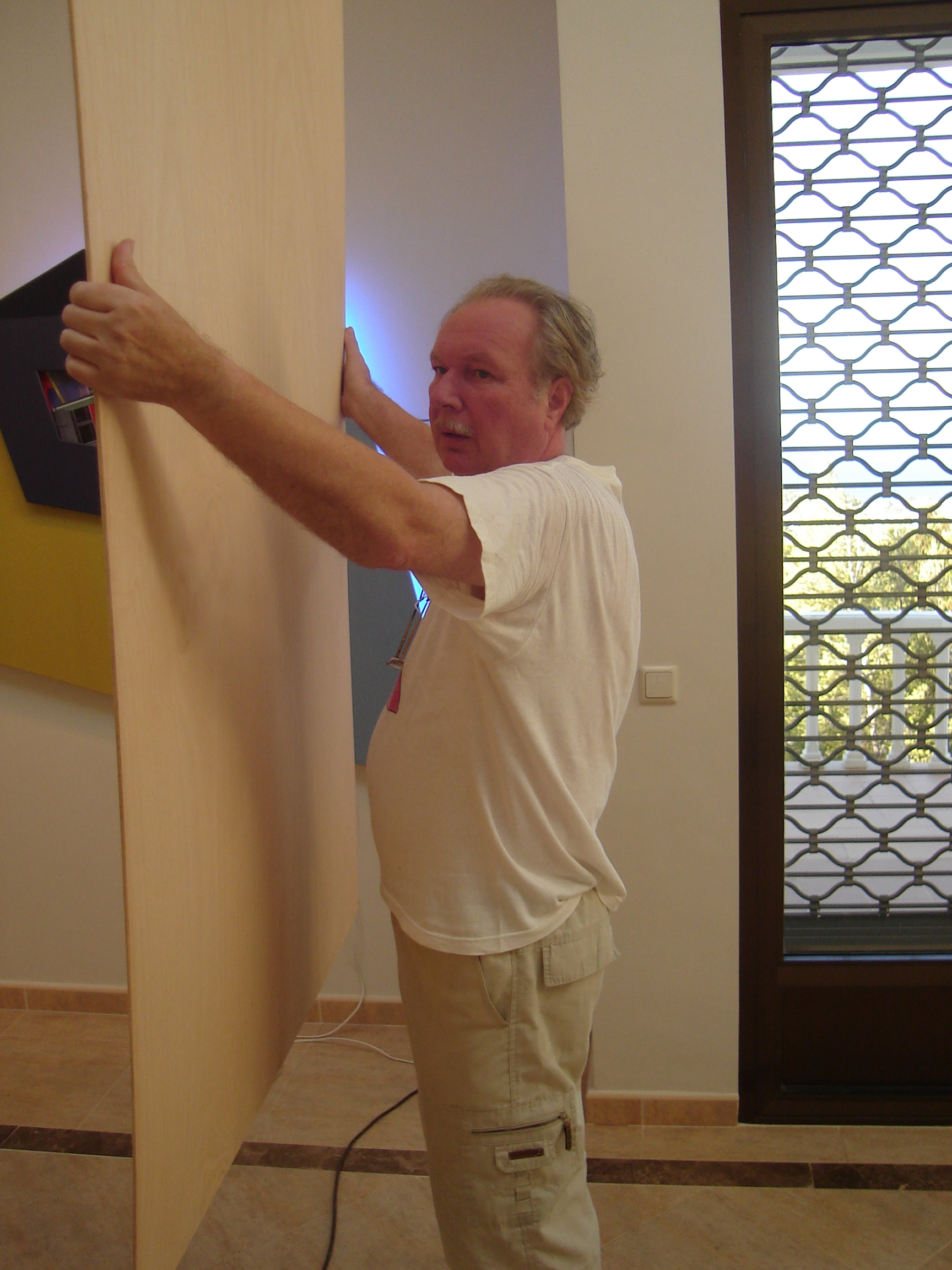 Hans Dieter Zingraff in seinem Atelier